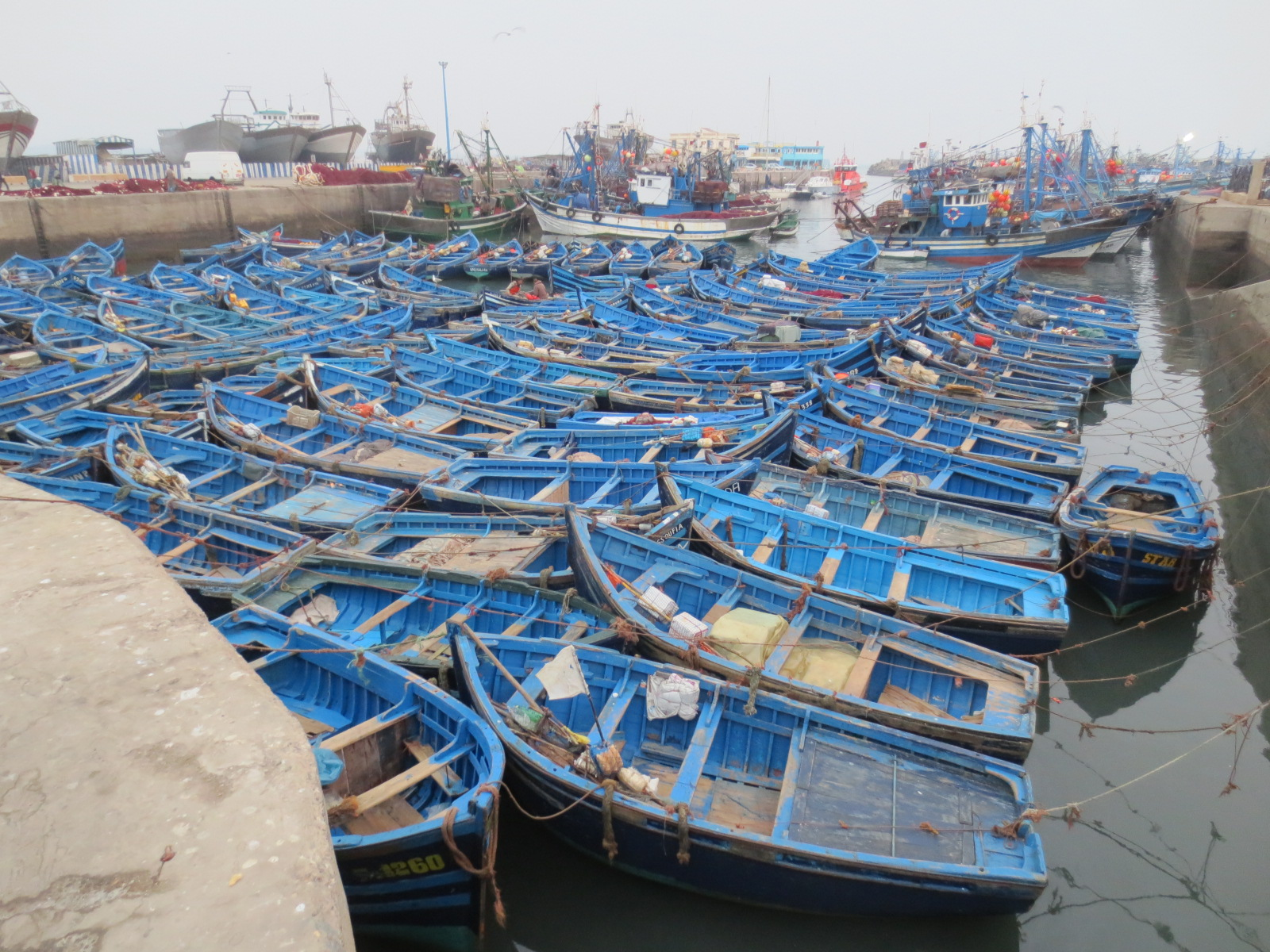 Essaouira Port and Ships